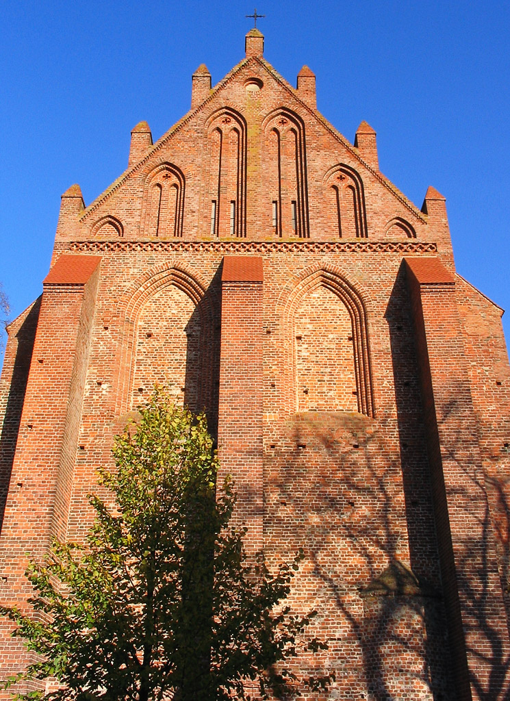 Beschreibung: Kirche in Franzburg / Pfarr/Schlosskirche Fotograf: Darkone, 21. Oktober 2004